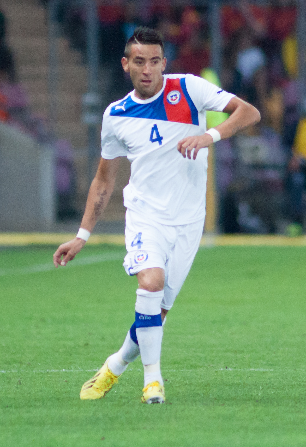 Espagne - Chili, 10 septembre 2013